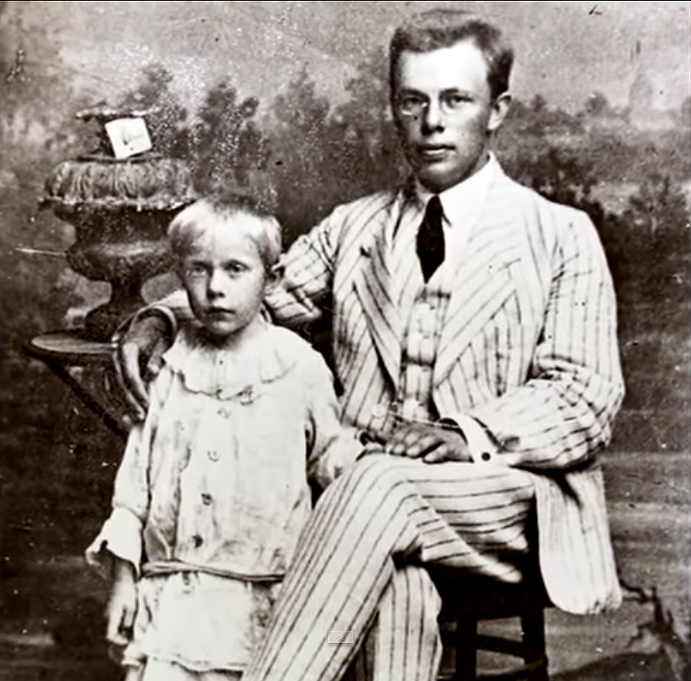 Микола Зеров з сином (1924 р. н.)